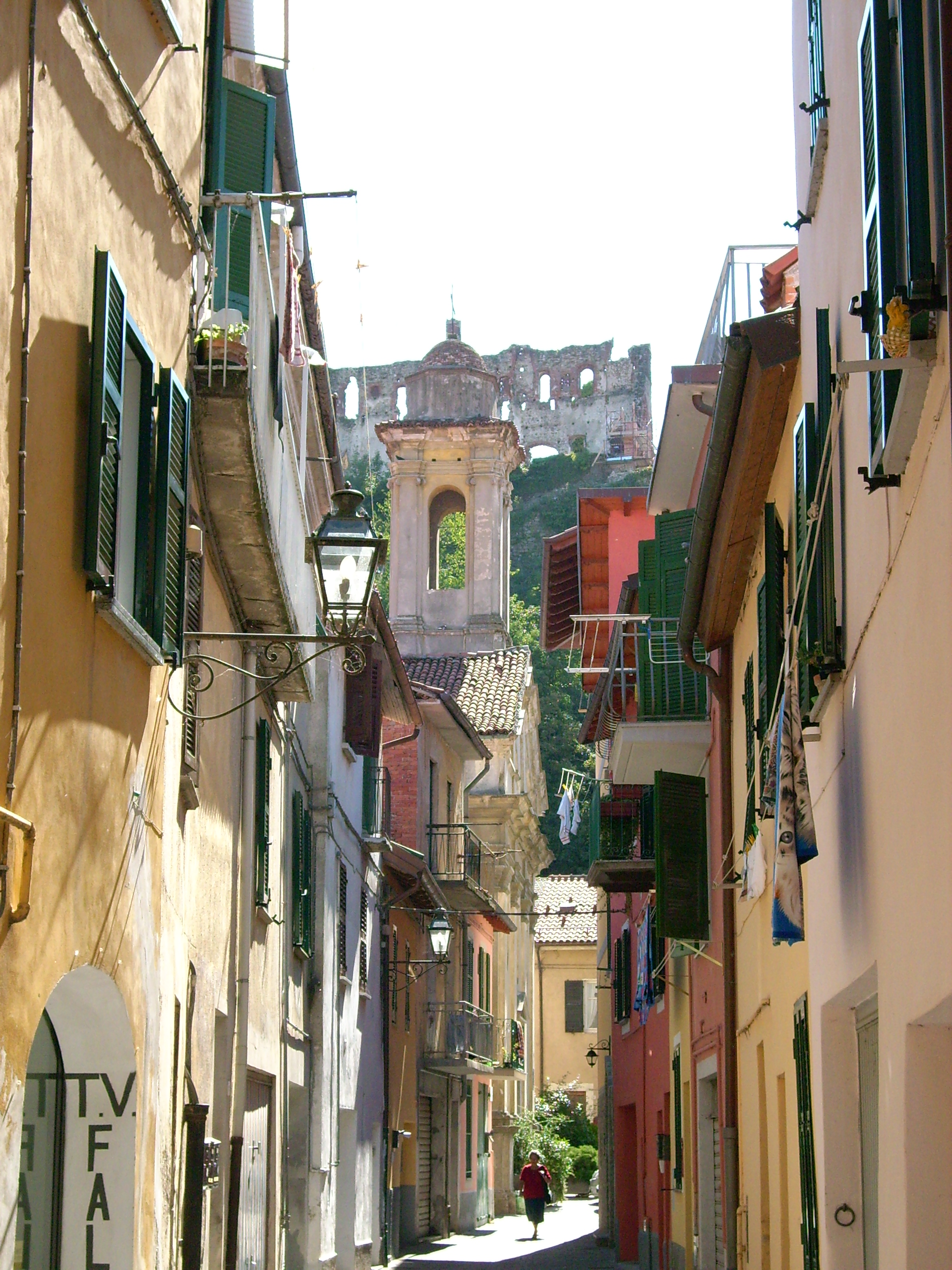 Cairo Montenotte, Liguria, Italia